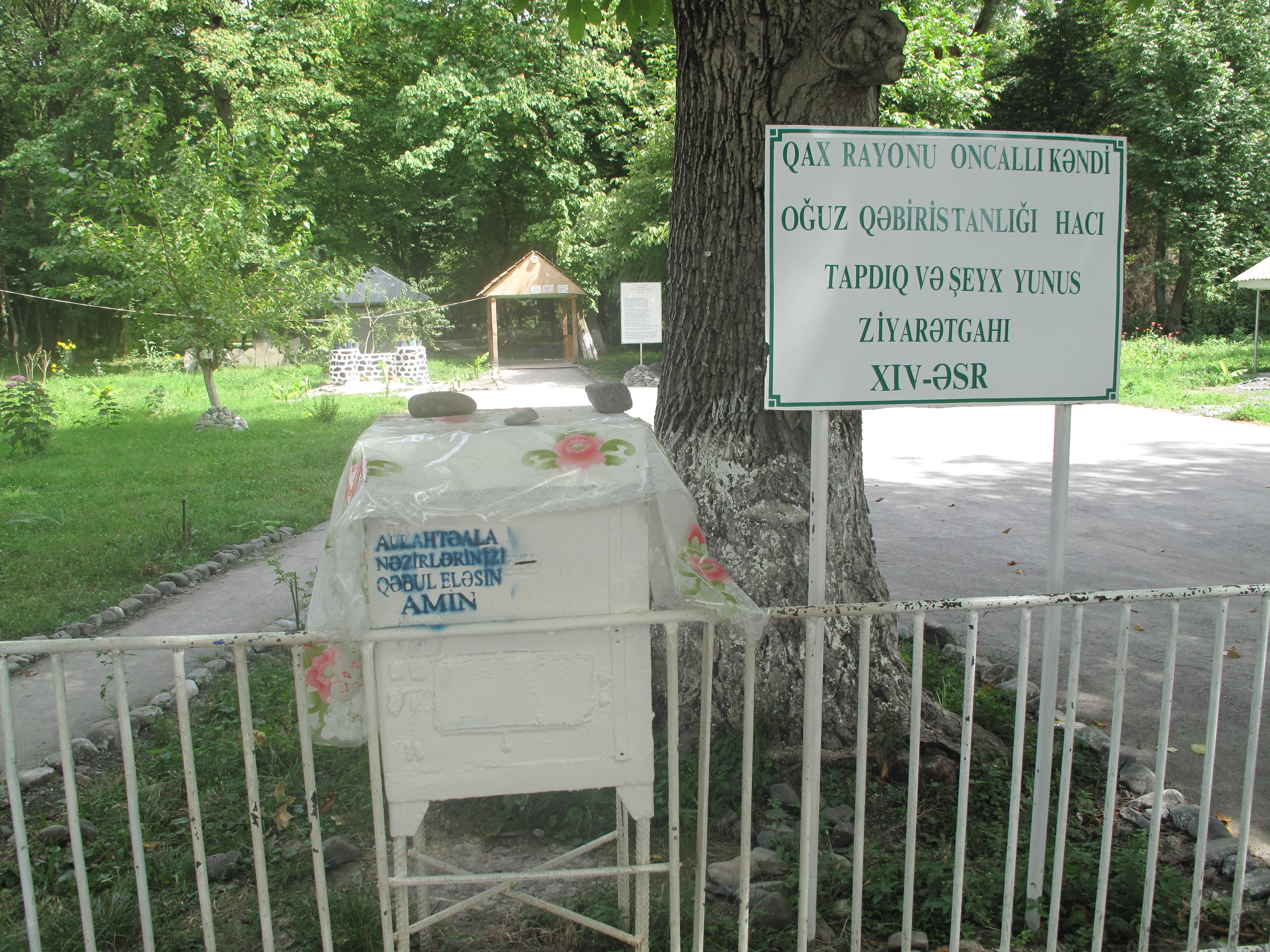 Oğuz qəbiristanlığı Hacı Tapdıq və Şeyx Yunus ziyarətgahı. XIV əsr. Qax rayonu Oncallı kəndi.